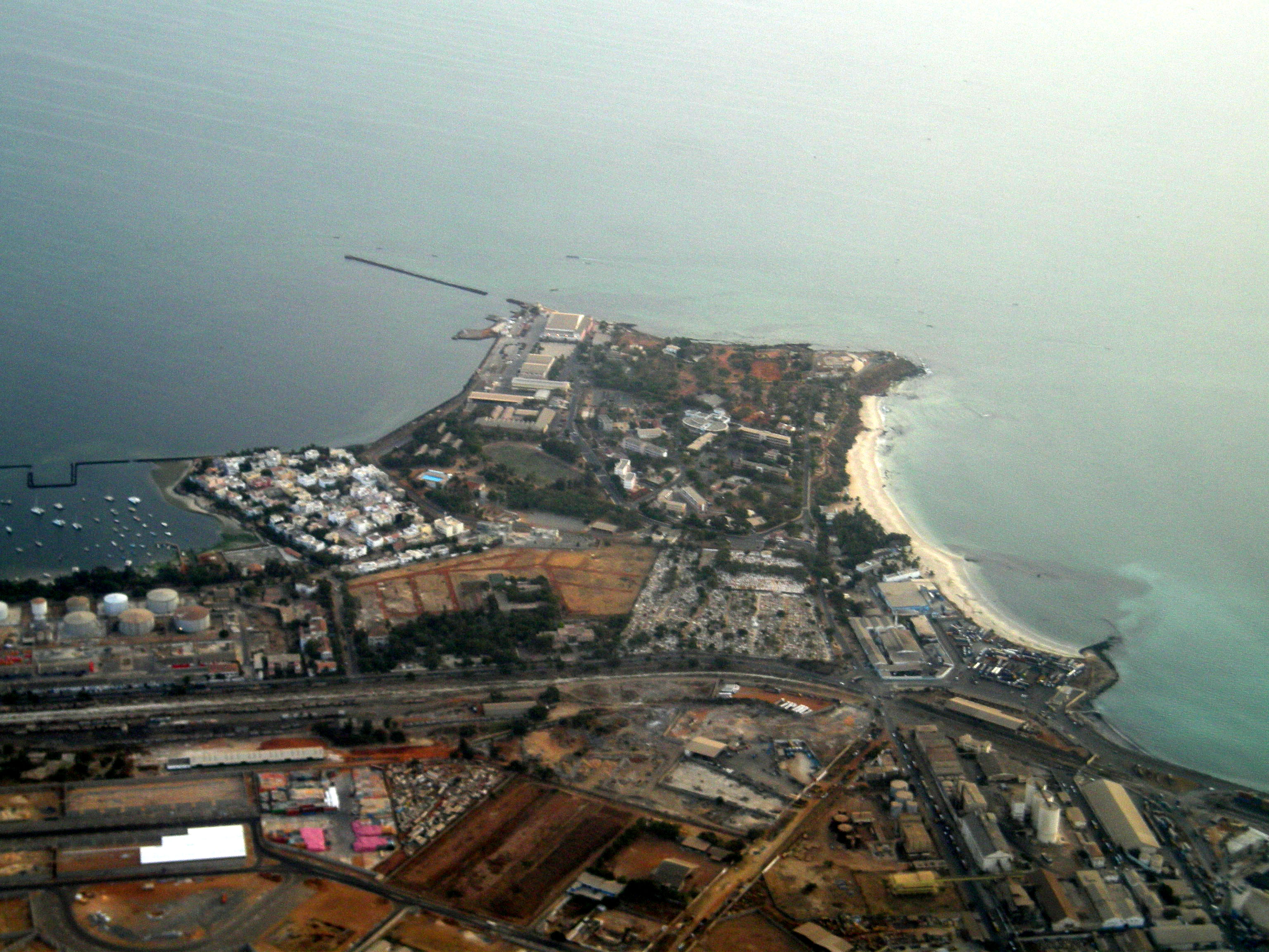 Vue aérienne de la pointe de Bel-Air et de la zone industrielle, à l'est de Dakar, Sénégal